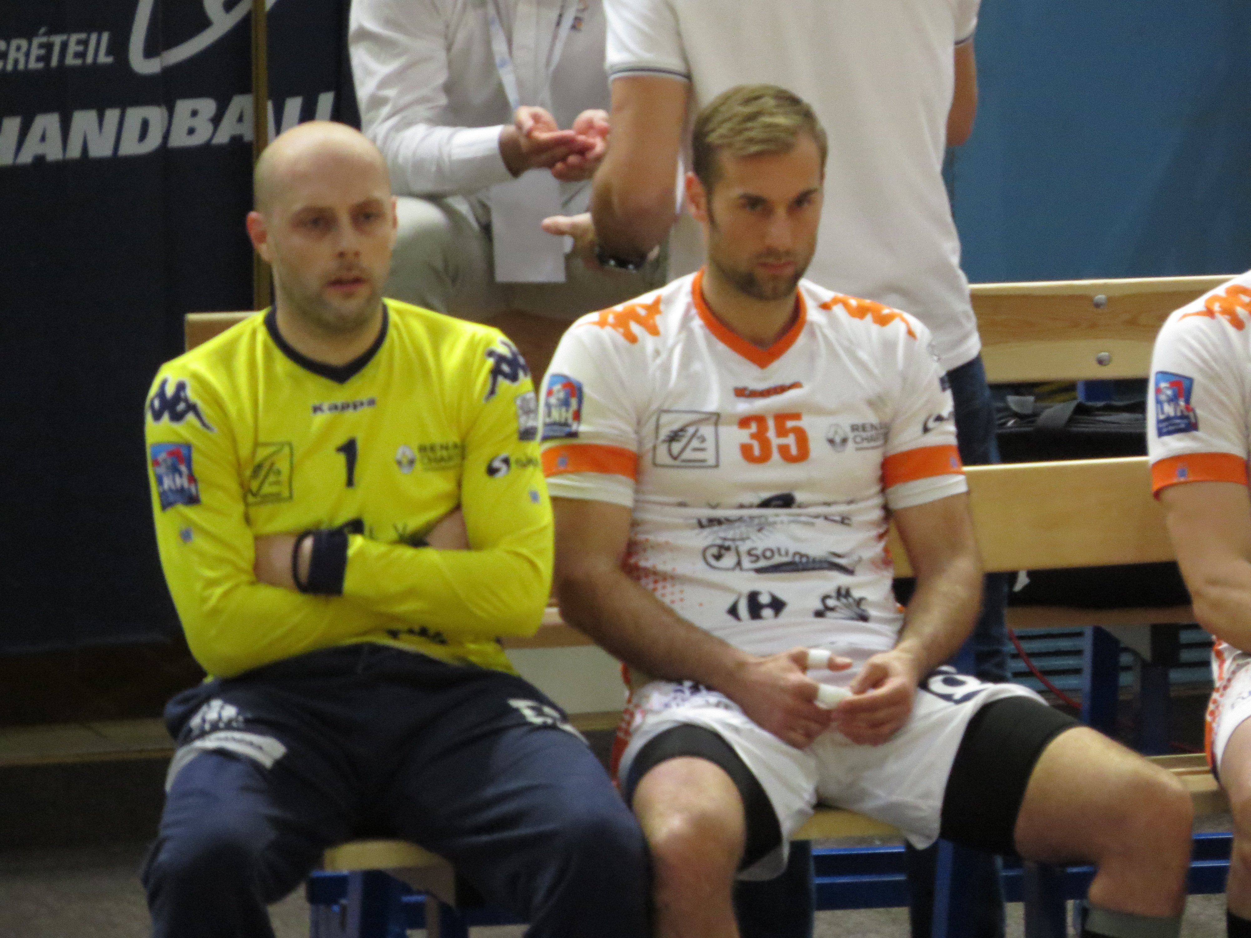 Match du championnat de France de Hand entre Créteil et Chartres Victoire de Créteil 39 - 35 1 : Nebojša Grahovac 35 : CUTURA Davor